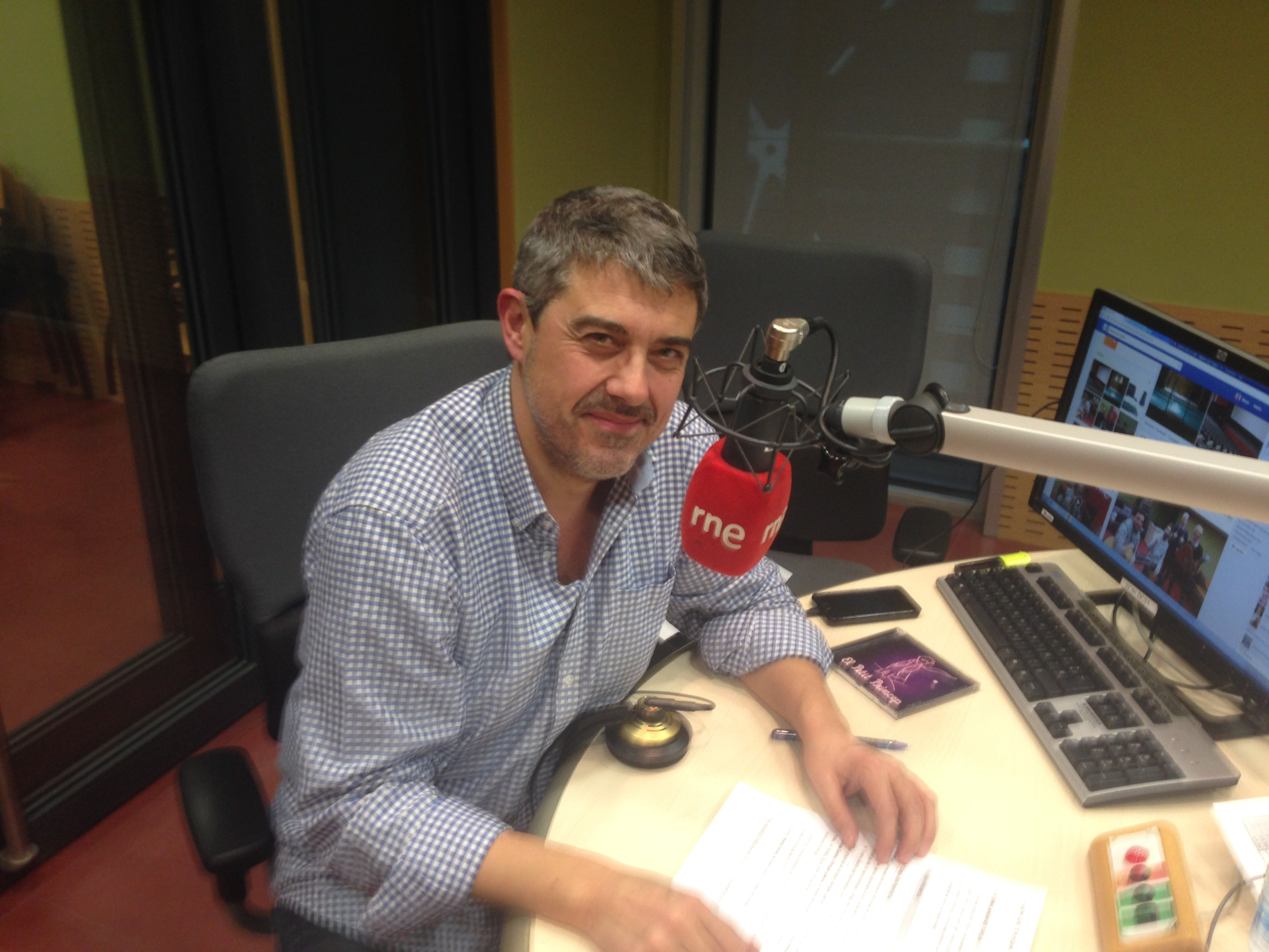 Goyo Prados als estudis de Ràdio 4, el 2014